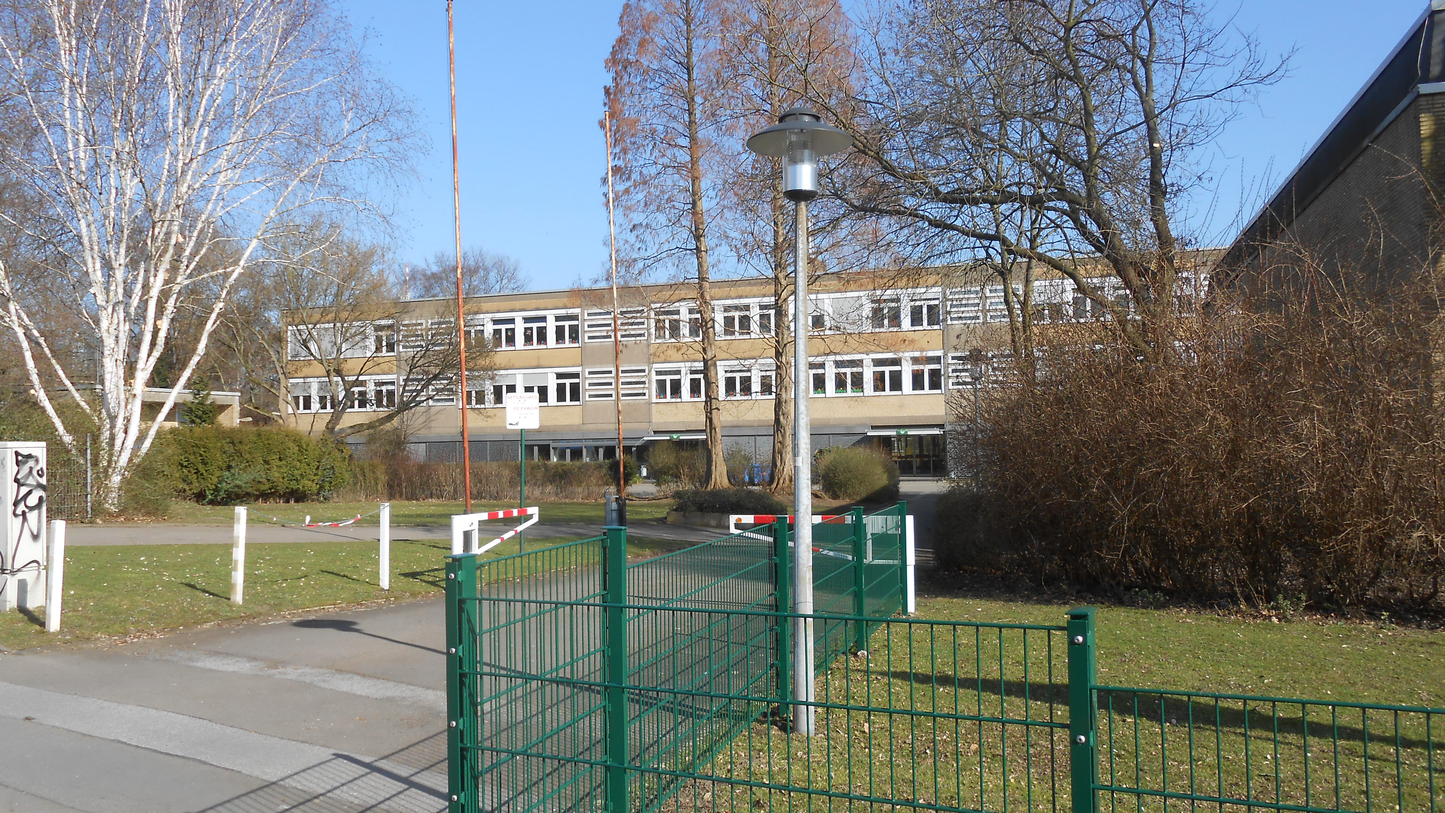 Frontansicht und Haupteingang des Max-Planck-Gymnasiums in Dortmund (März 2014)